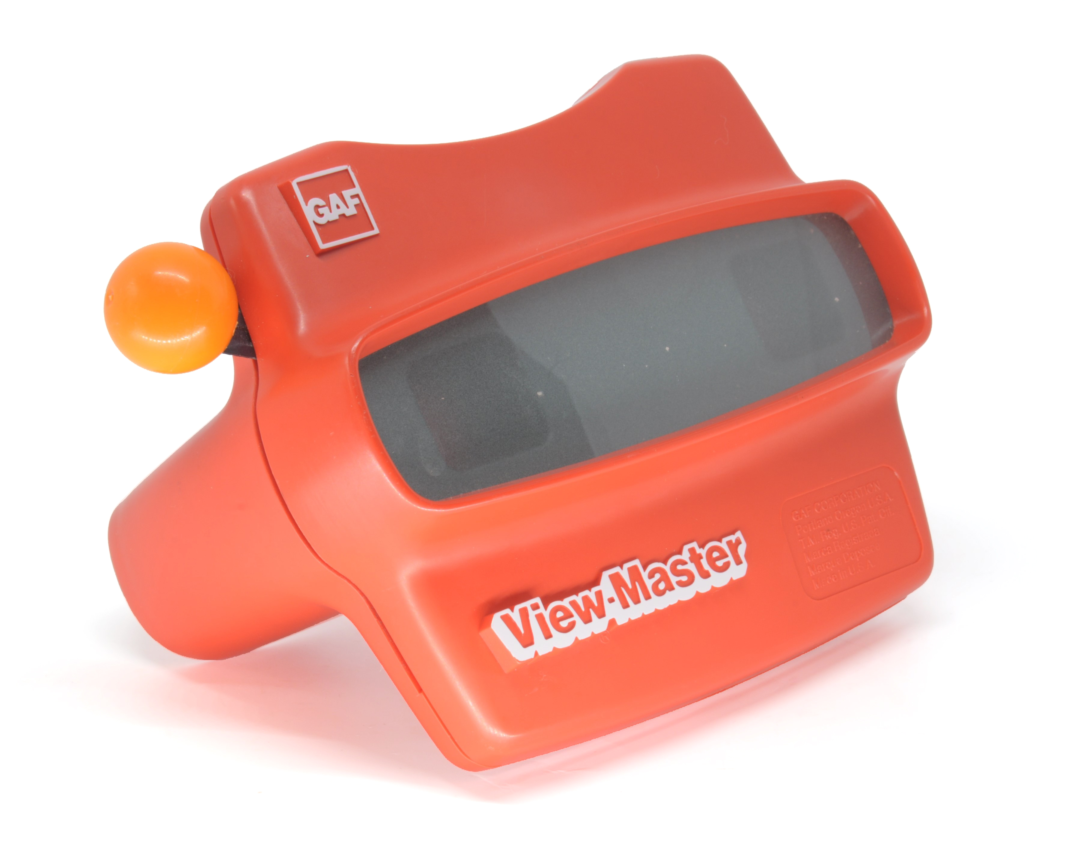 กล้องดูภาพสไลด์สามมิติ วิว-มาสเตอร์ โมเดล แอล ยอดนิยมในประเทศไทย